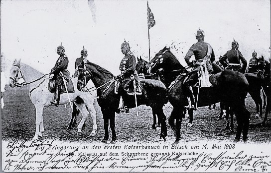 Zur Erinnerung an den ersten Kaiserbesuch in Bitsch am 14. Mai 1903. Se. Majestät auf dem Schanzberg genannt Kaiserhöhe